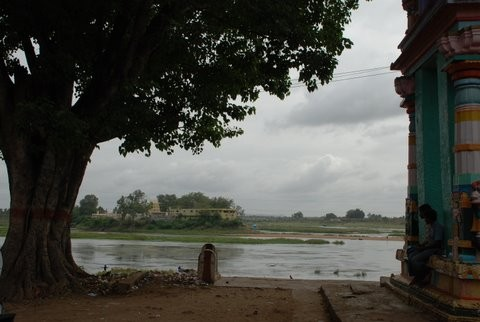 Tirumakudlu - Sangam of Kavari river, Kabini and river at T.Narsipur